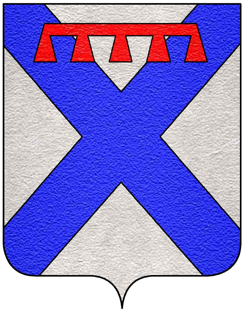 Stemma della famiglia Ridolfi di Ponte